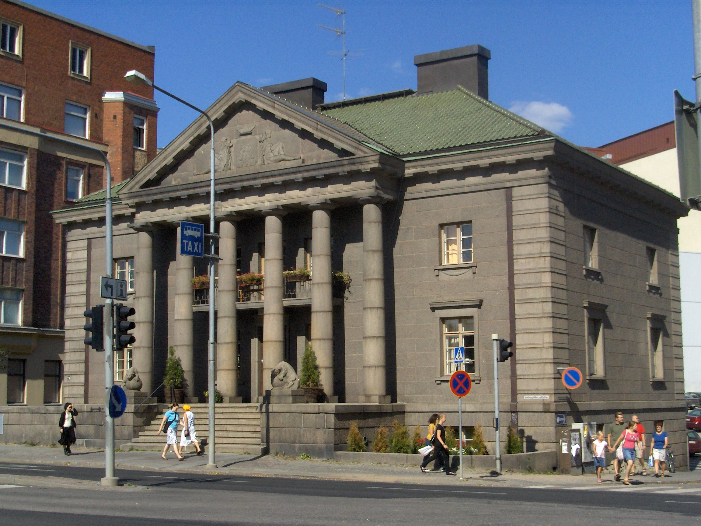 Haarla palace in Tampere